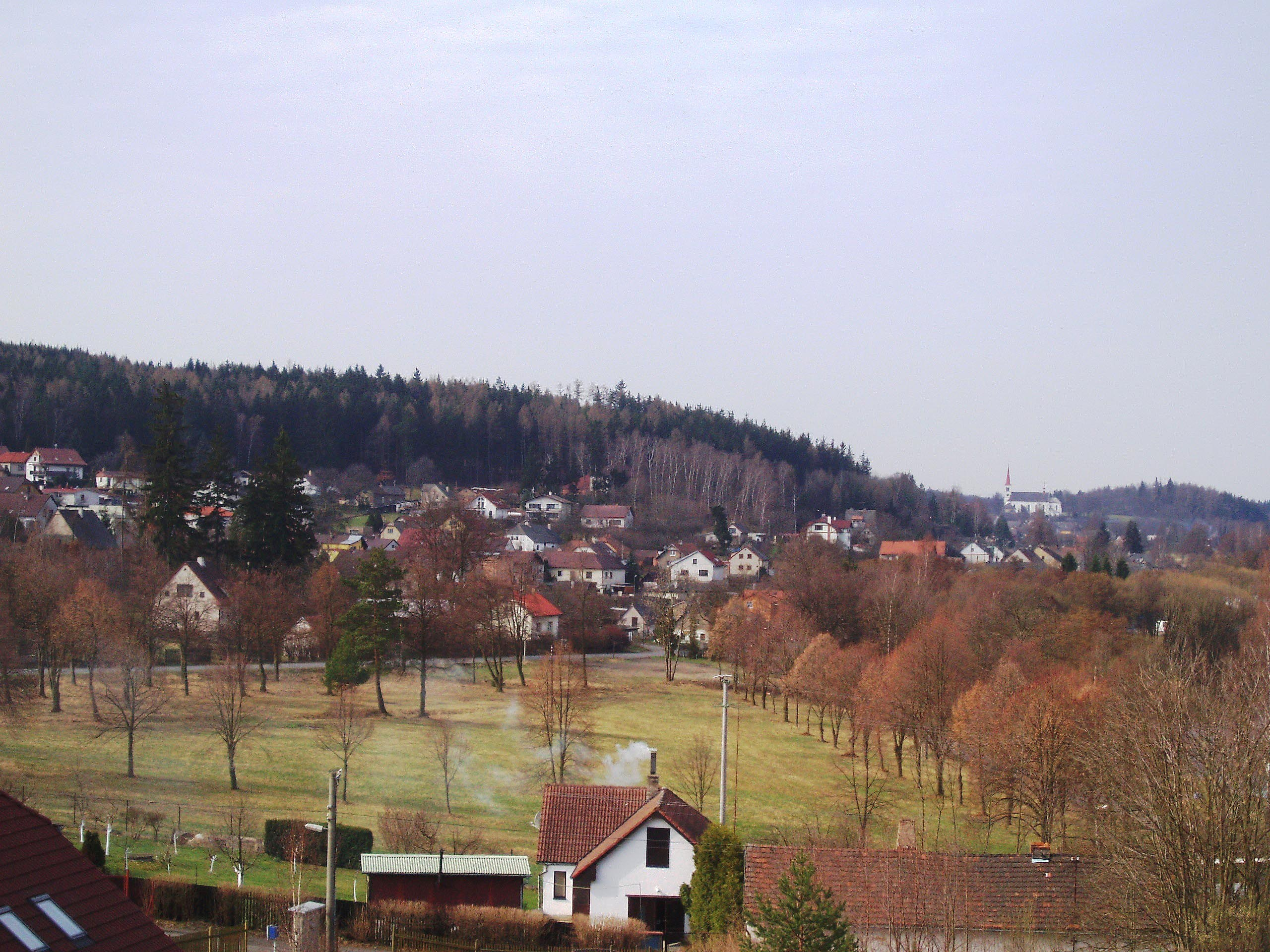 Havírna,obec spojující Vysokou Pec a Bohutín